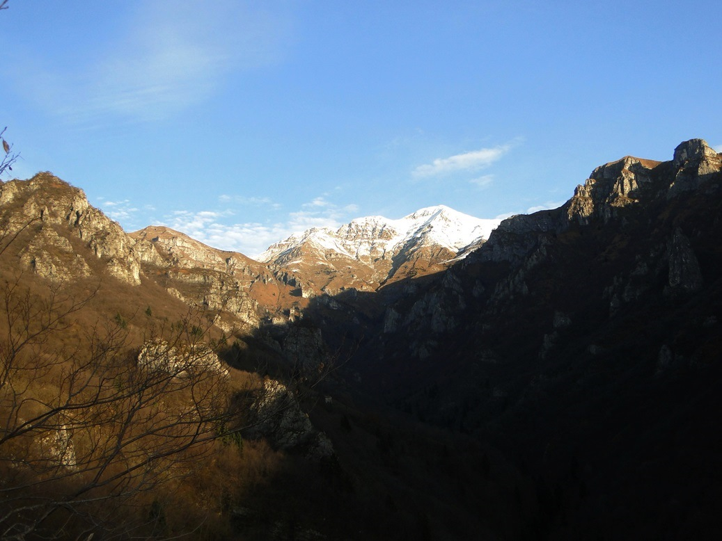 Vista della val Dossana, sovrastata dalla Cima di Fop. Prealpi Bergamasche (BG)